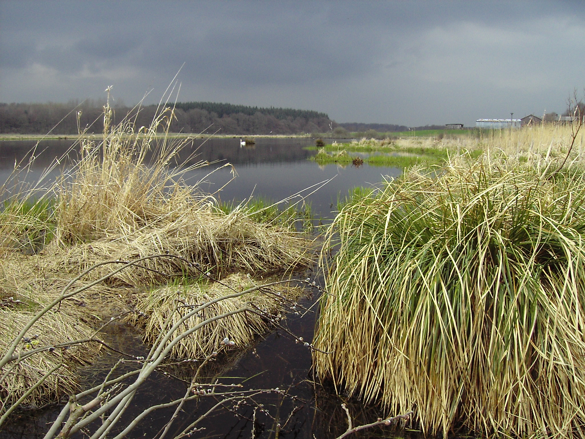 Pohnsdorfer Stauung - Westpolder, Blick in nordwestliche Richtung